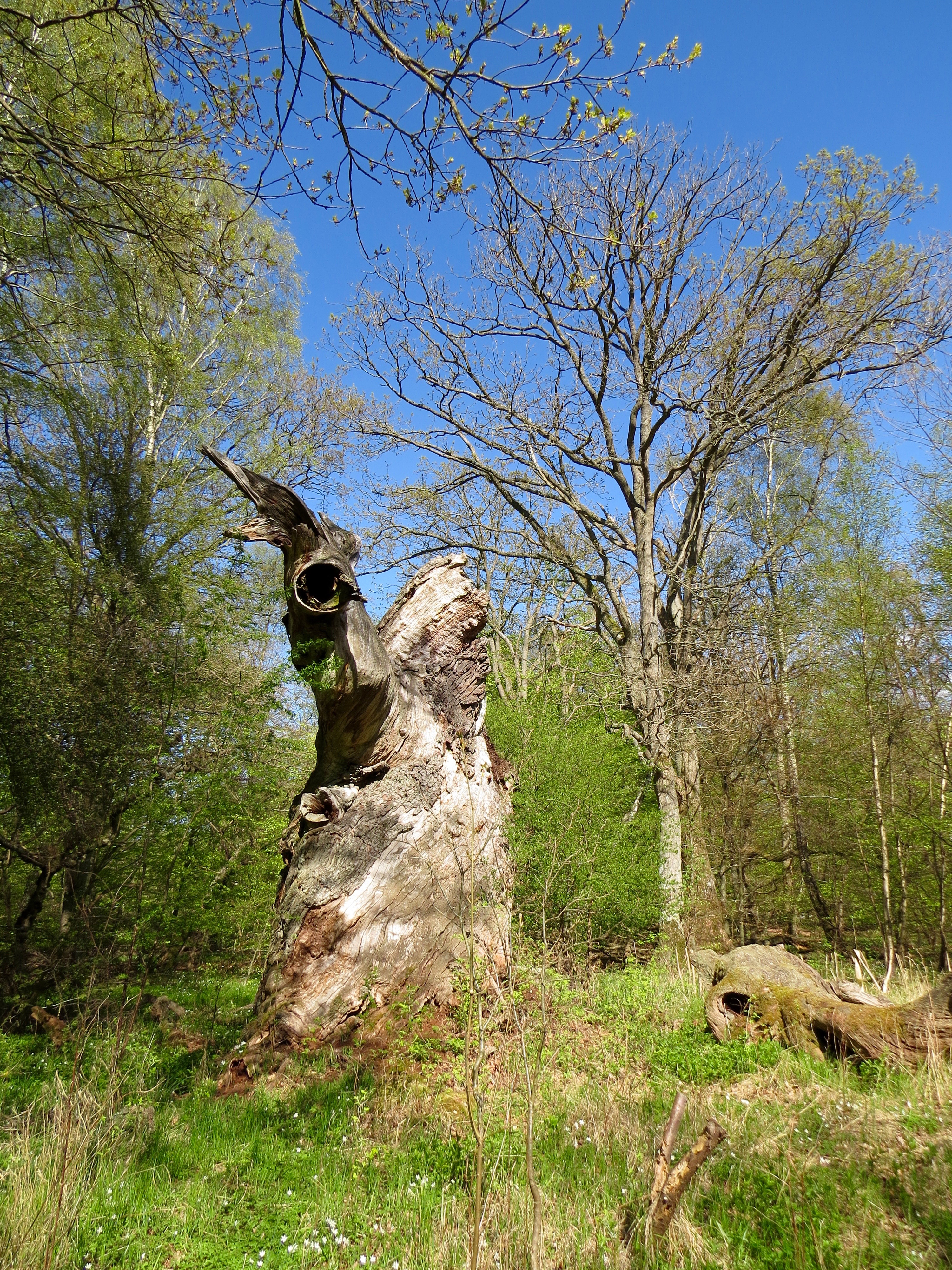 Snoegen, Jægerspris